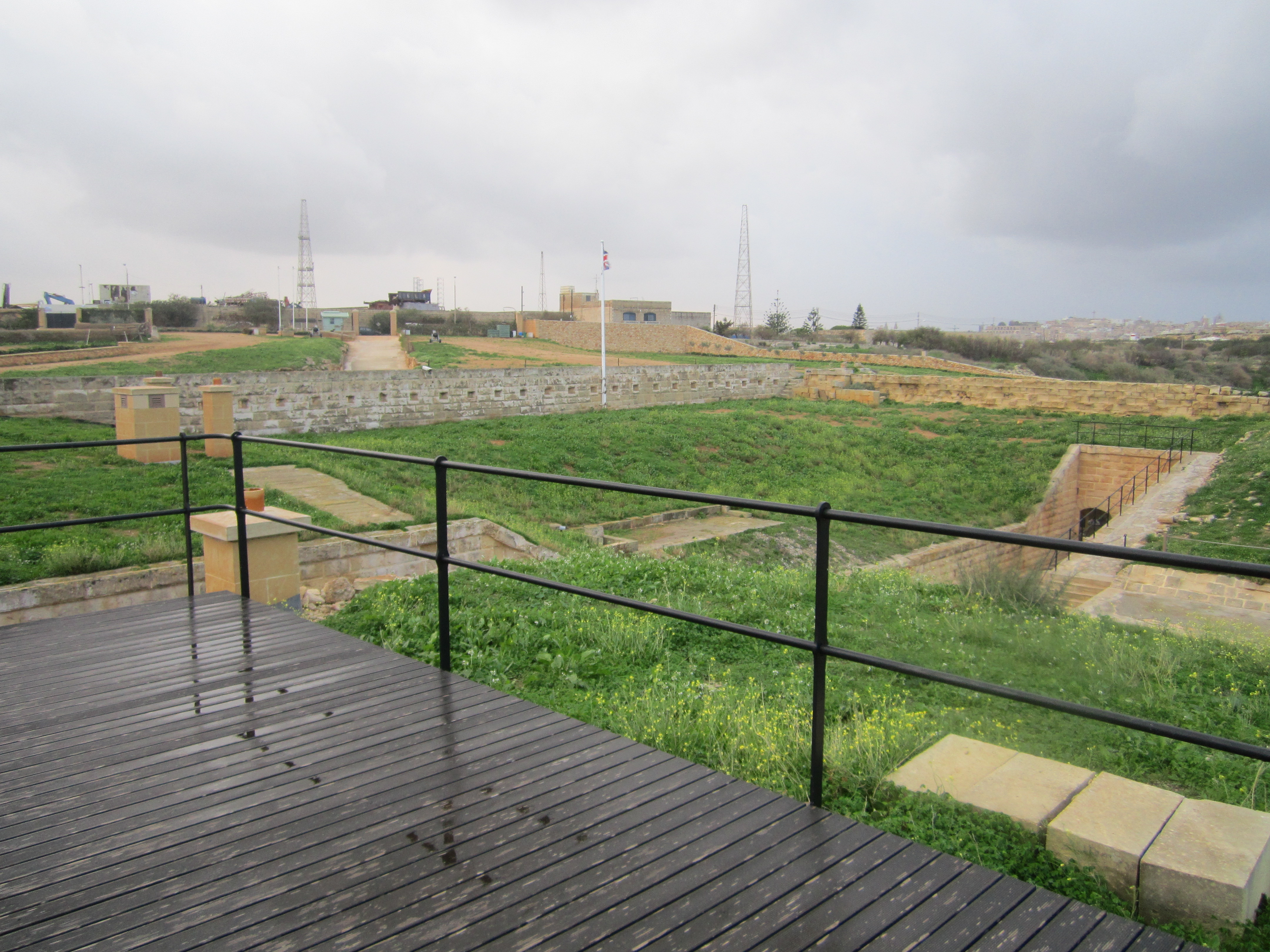 El fuerte visto desde una plataforma en el centro del mismo